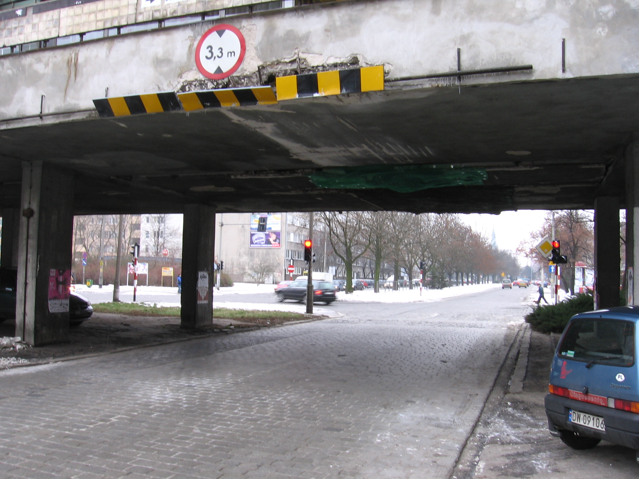 prześwit wynoszący tylko 3,3 m powodował, że powstawały tu nieustannie uszkodzenia wskutek kolizji samochodów zbyt wysokich, aby się pod nim mogły zmieścić